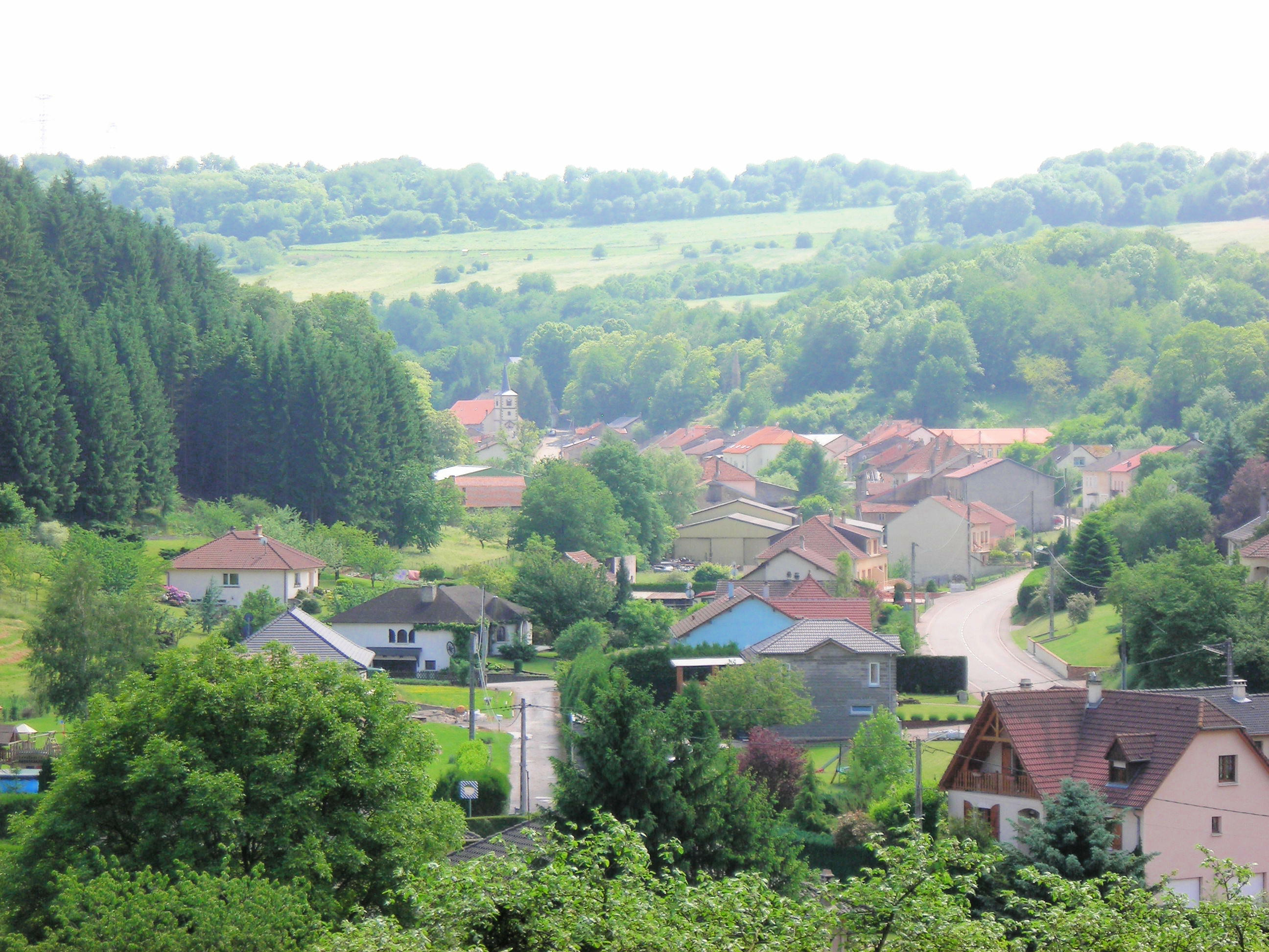 Panorama du village de Bisten-en-Lorraine (Lorraine, France) depuis le bout de le chemin venant de la chapelle de Varsberg.